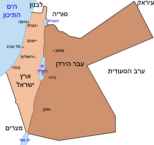 Palestine And Transjordan